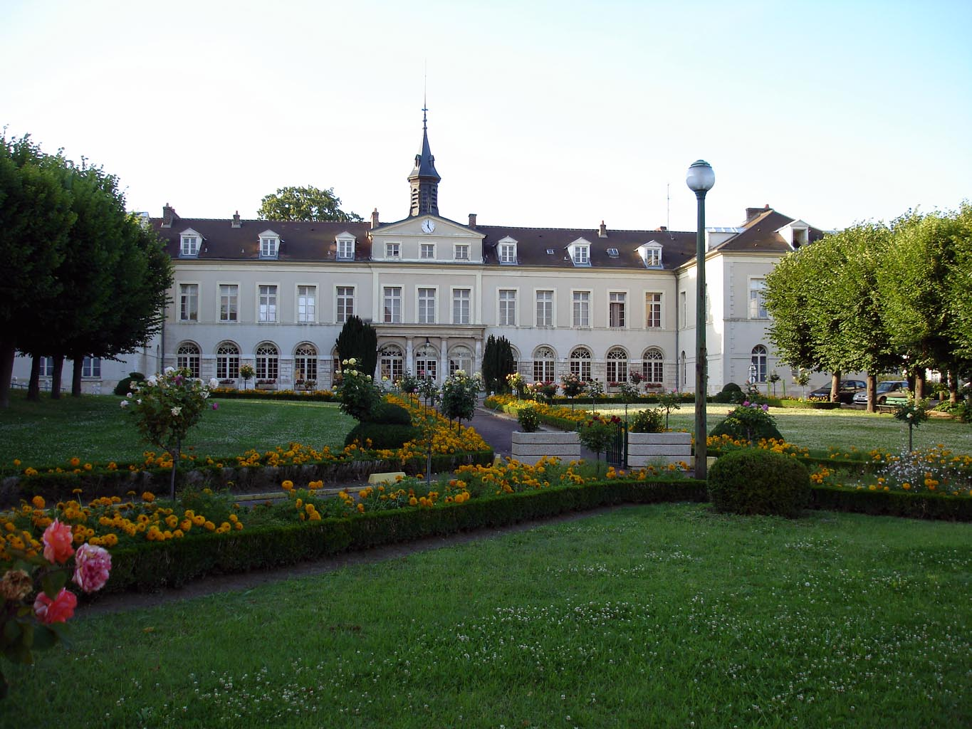 L'Hôtel-Dieu à Gonesse (Val-d'Oise), France